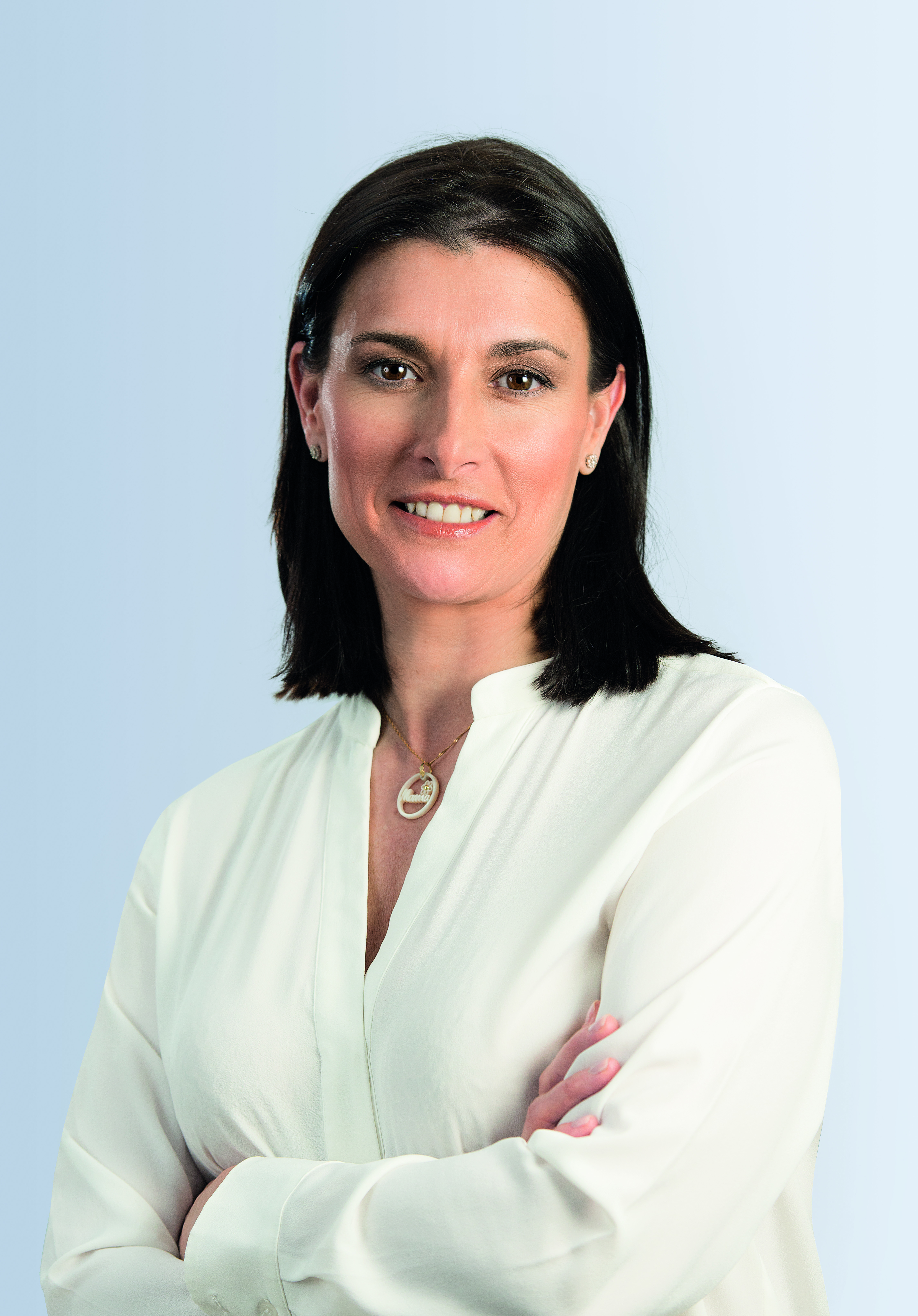 Gema Igual, candidata a alcalde de Santander